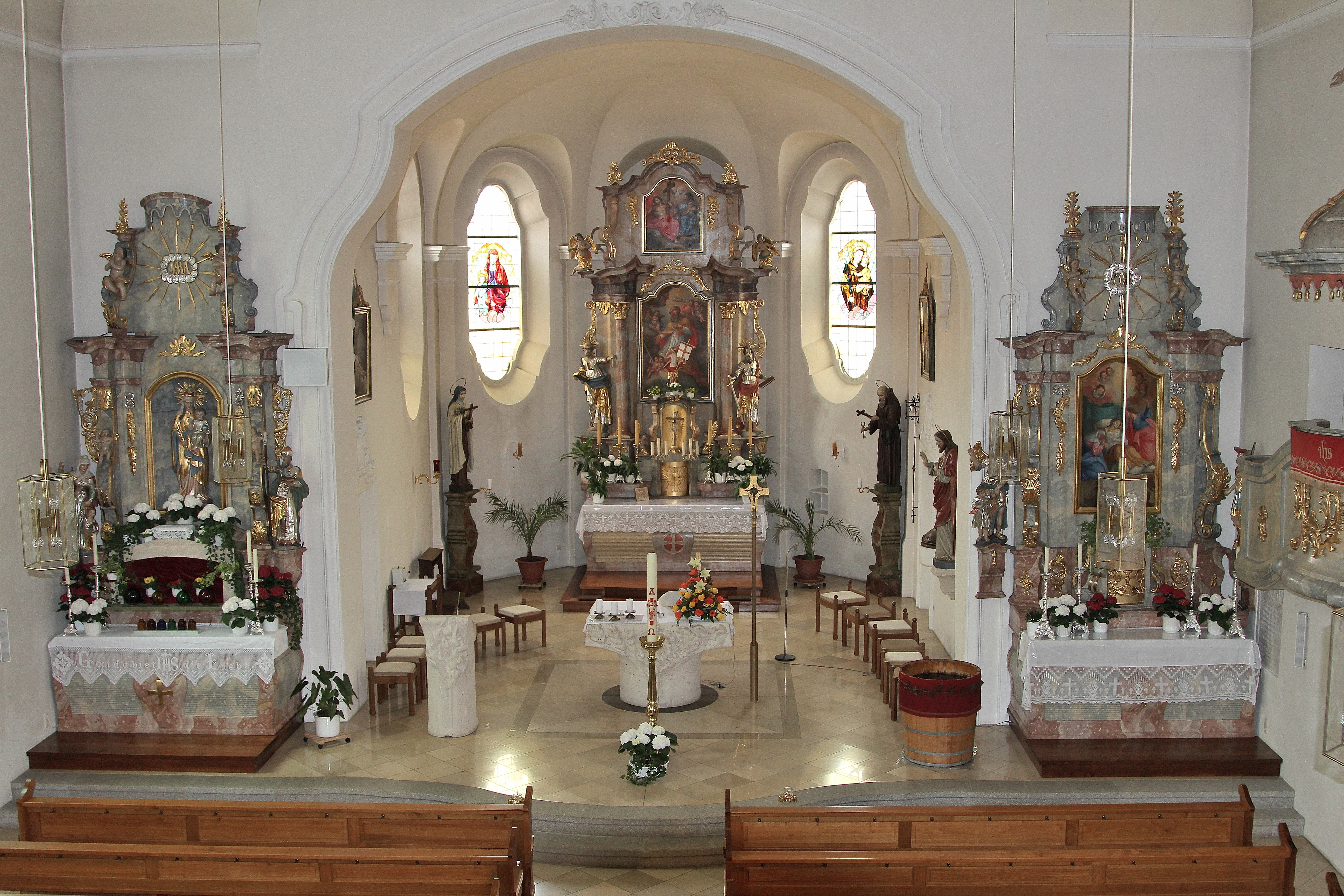 Roggenstein, St. Erhard; Stadt Vohenstrauß, Landkreis Neustadt an der Waldnaab, Oberpfalz, Bayern